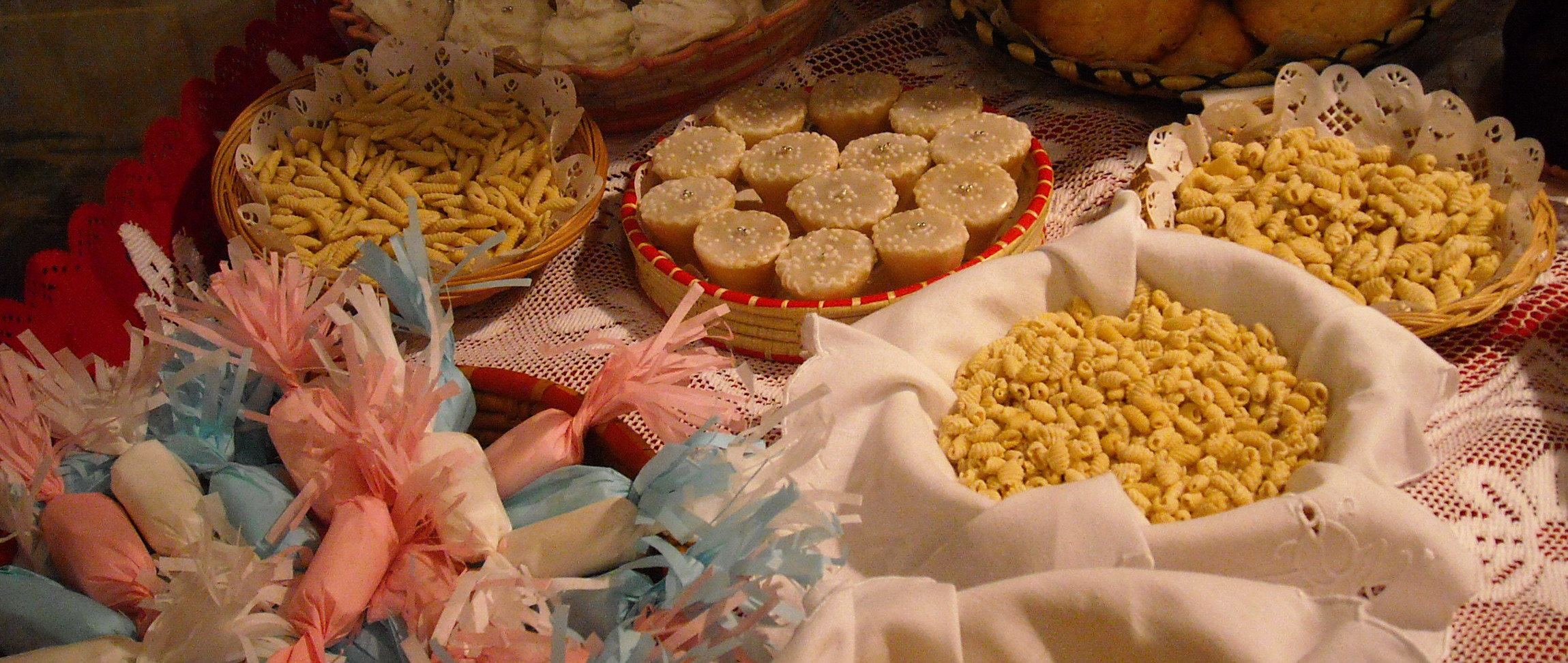 Mostra di pani e dolci tradizionali della Sardegna - Casa Angioni, Quartucciu (Cagliari).